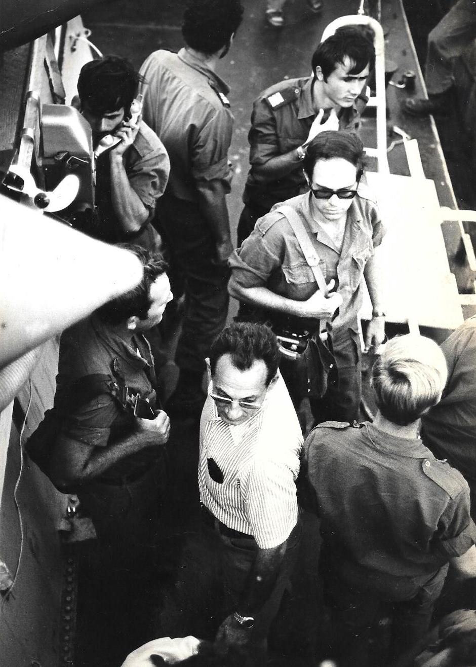 אלוף שלמה אראל (בלבוש אזרחי) מגיע לאח"י רשף לקראת יציאה להפגזת החוף הסורי. למעלה מימין סרן אלכס טל.